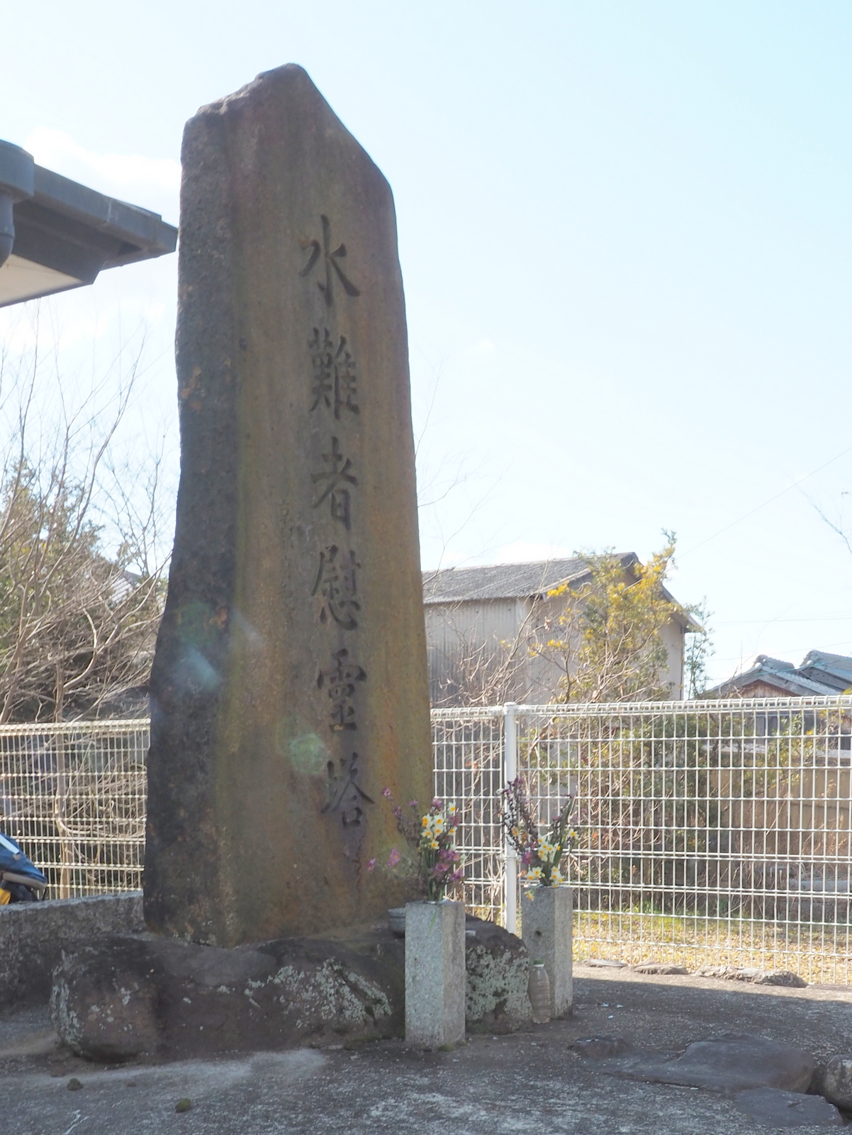 京都府綴喜郡井出町の石垣区公民館にある水難者慰霊塔。1954年に建立。